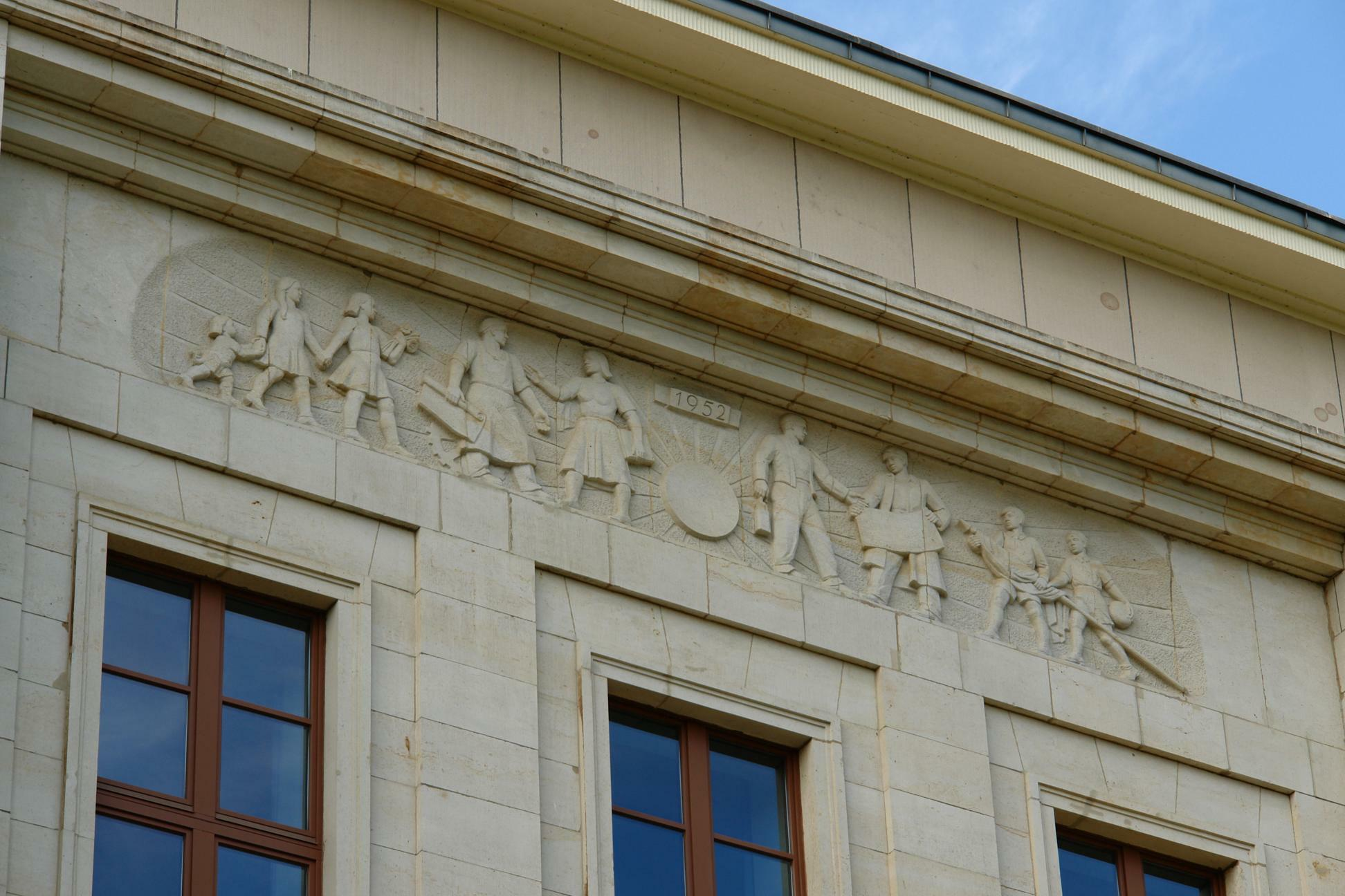 Wandrelief über dem Portal der ehem. Pädagogischen Hochschule Dresden, heute Sitz des Sächsischen Staatsministeriums für Wissenschaft und Kunst, Wigardstraße 17, Dresden-Neustadt.